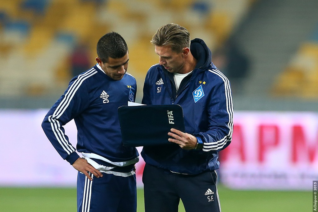 16.10.2015 г.Киев. НСК "Олимпийский". 11-й тур Лиги Пари-Матч. Динамо Киев - Шахтер Донецк - 0:3